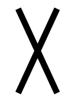 runic letter gebo